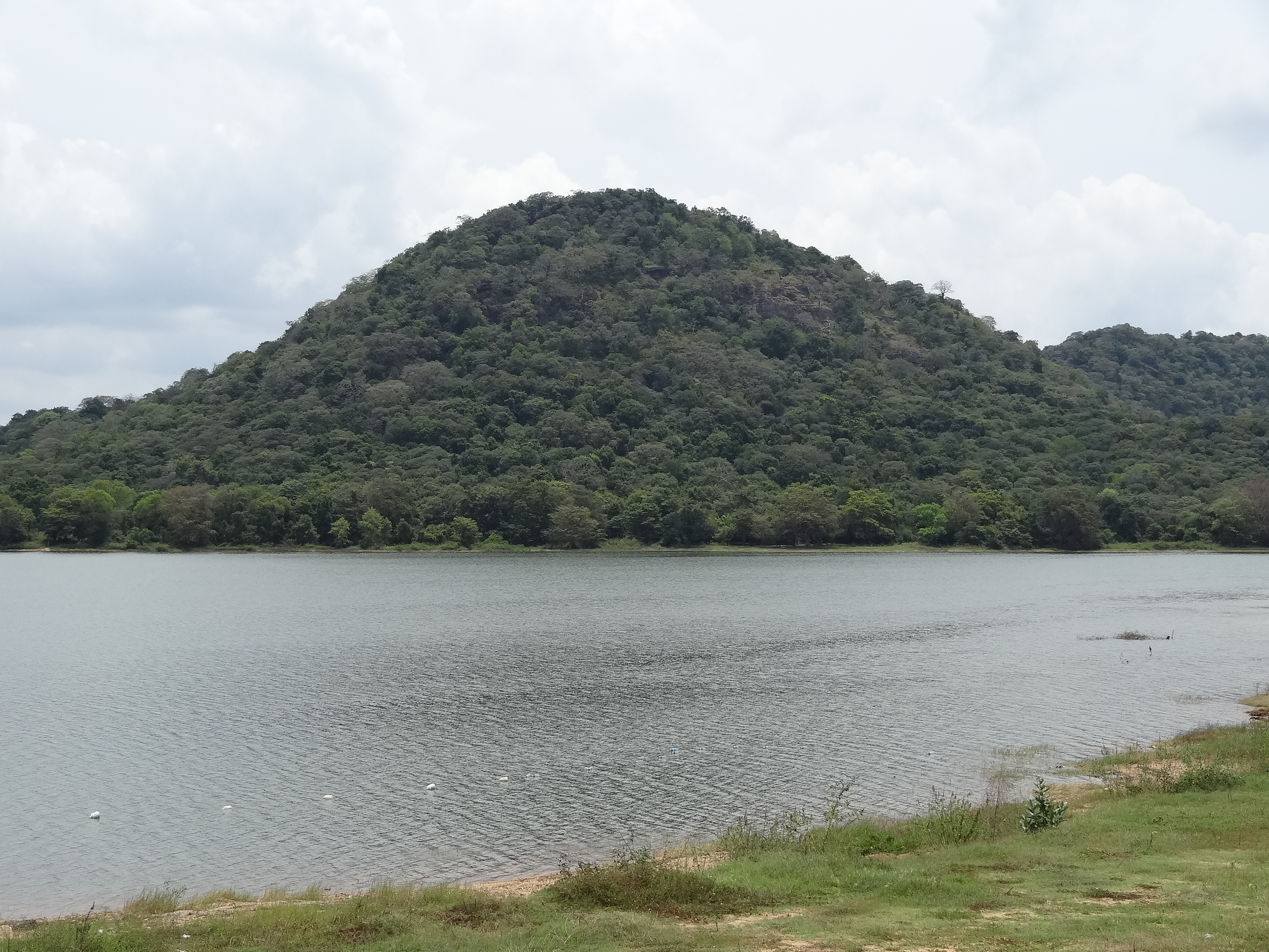 Minneriya